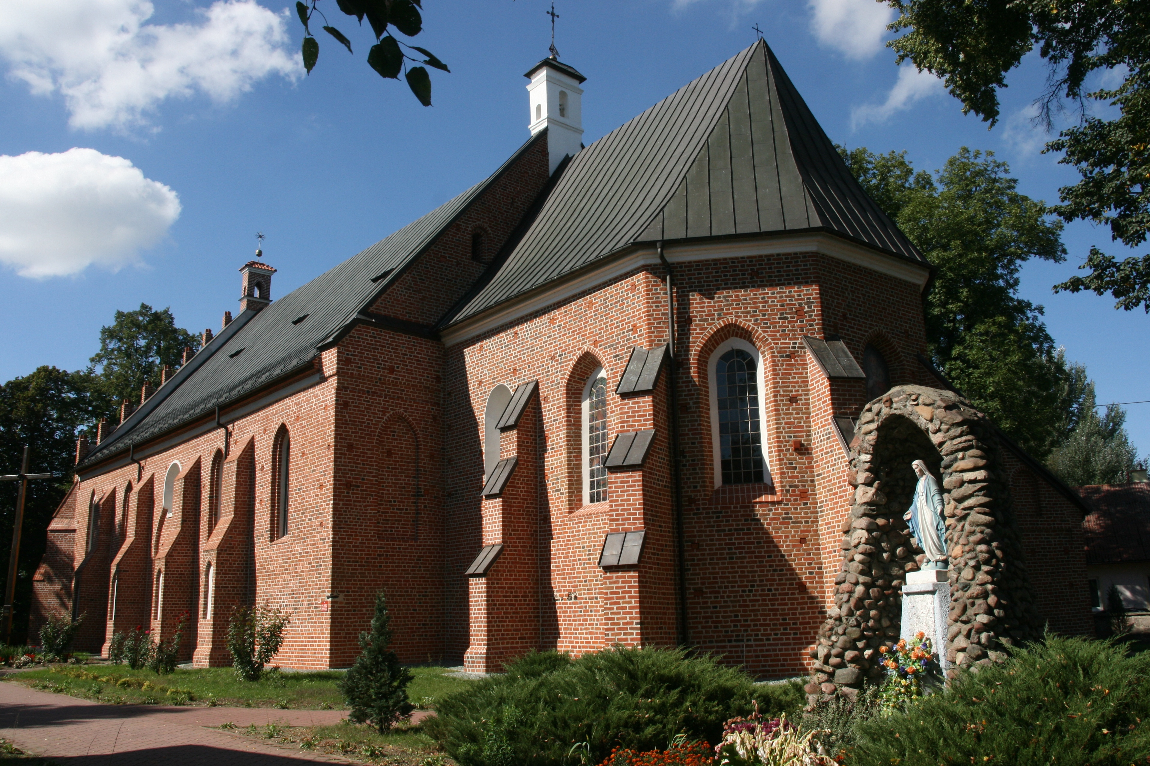 Bielawy, ul. Kościelna 8 - kościół parafialny pw. Nawiedzenia N.M.P. i św. Józefa, XV-XIX, XX (zabytek nr rejestr. 105)